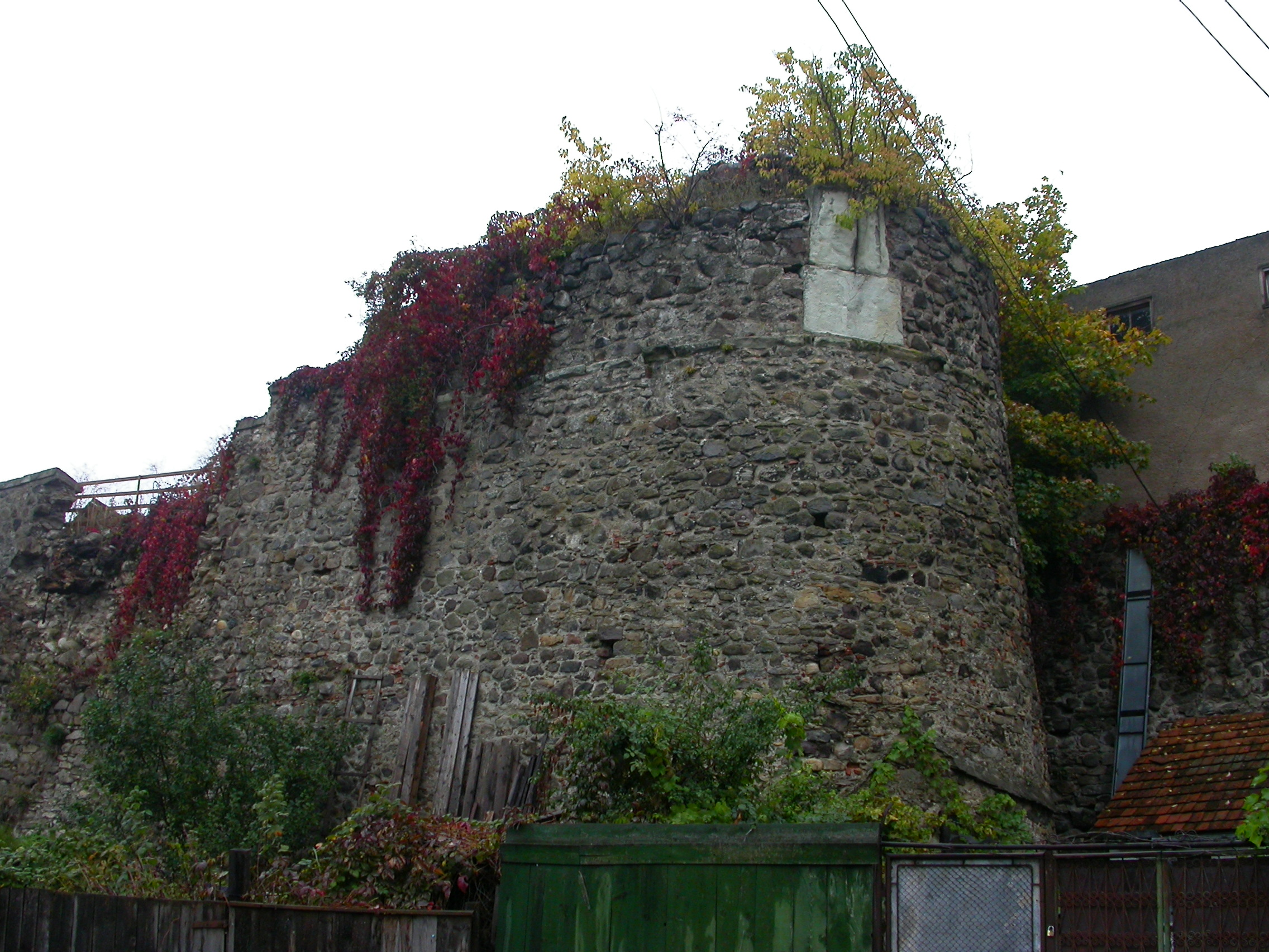 Ruinele cetății Székely Támadt, 1562